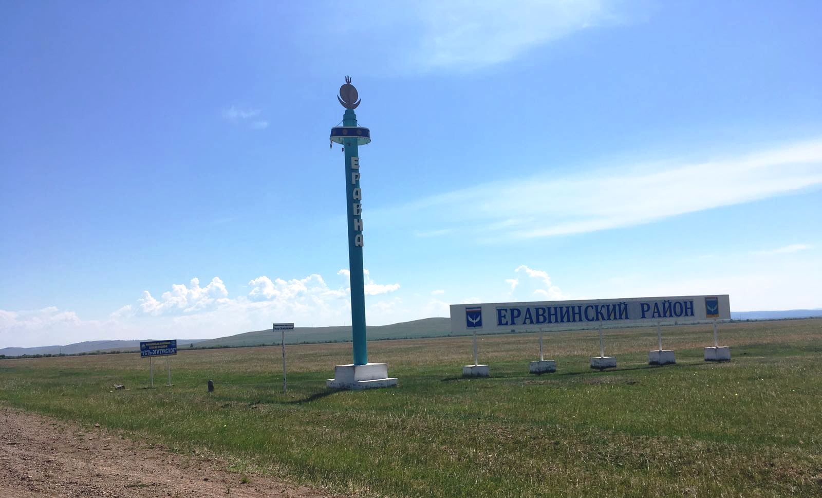 При въезде в Еравнинский район